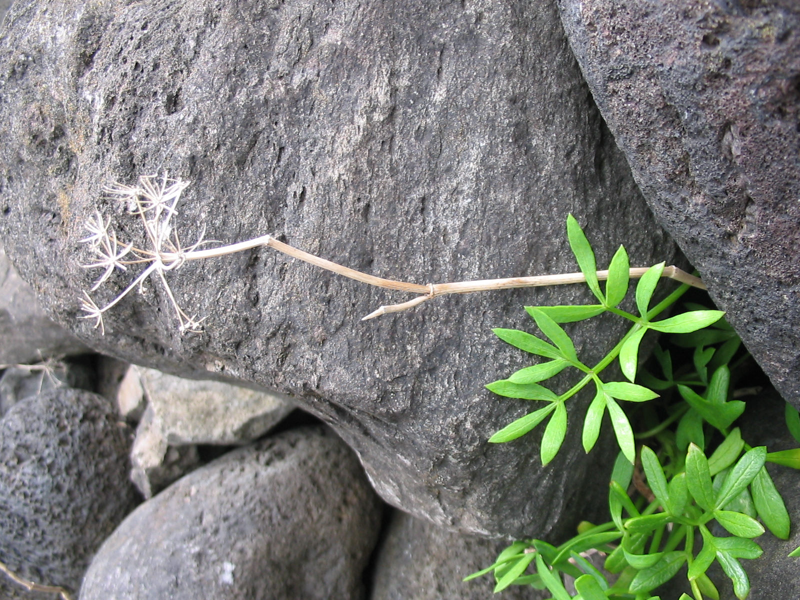 Dreiblättrige Knorpelmöhre (Ammi trifoliatum) - Base